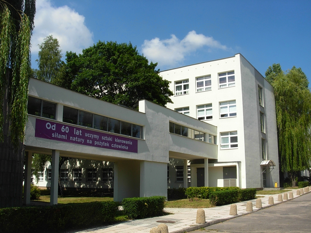 Campus UTP Bydgoszcz-Fordon